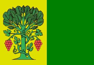 Bandera Municipal de A Pobra do Brollón (Lugo)